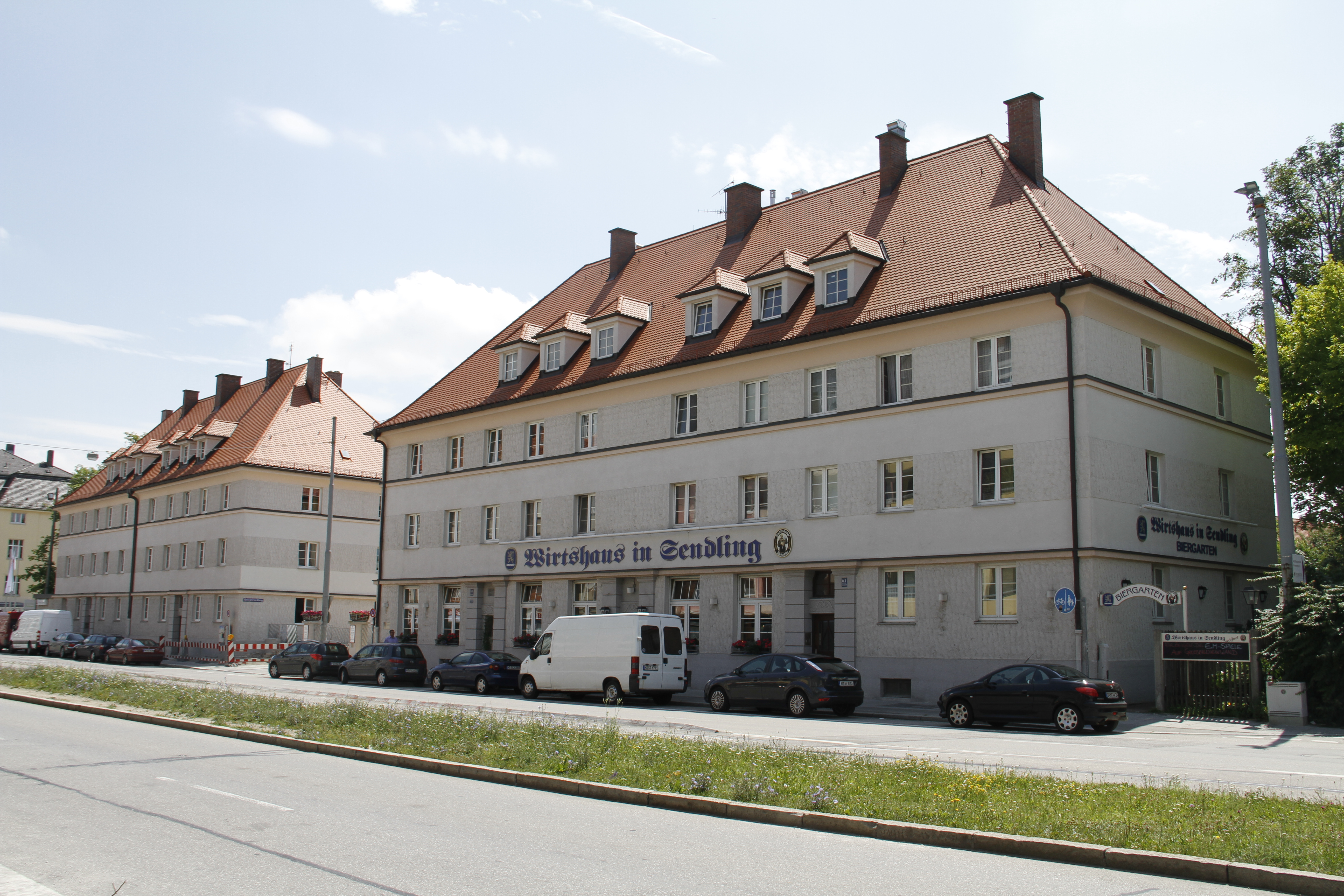 Kriegersiedlung München, zwei Kopfbauten an der Albert-Rosshaupter-Straße markieren das nördliche Ende der Kriegersiedlung. Links die Häuser Albert-Rosshaupter-Straße 57/59 ehemals mit drei Läden, rechts Albert-Rosshaupter-Straße 61/63 ein traditionsreiches Wirtshaus mit Biergarten.